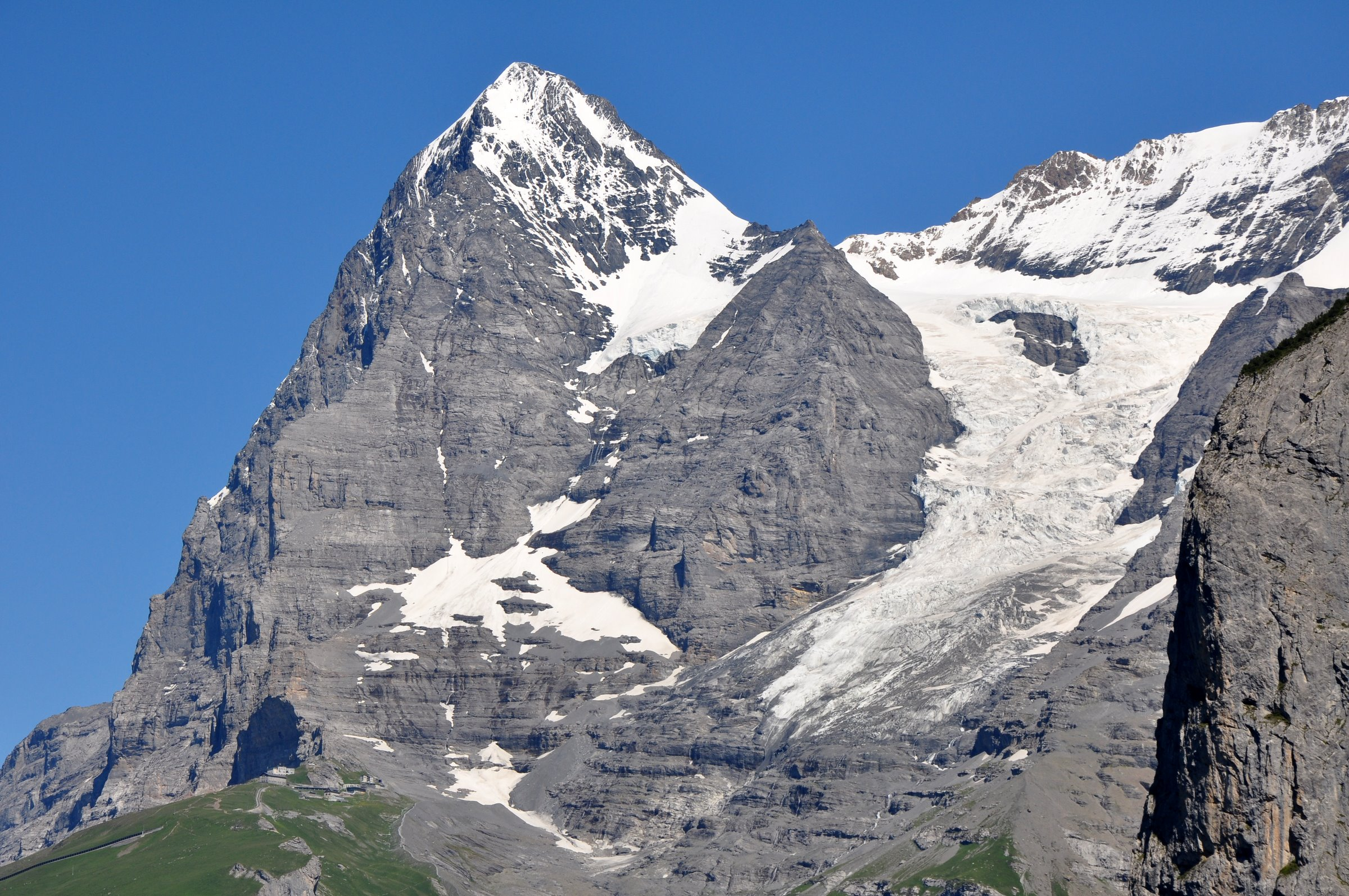 Switzerland, Canton of Bern, Eiger and Eiger Glacier from Mürren